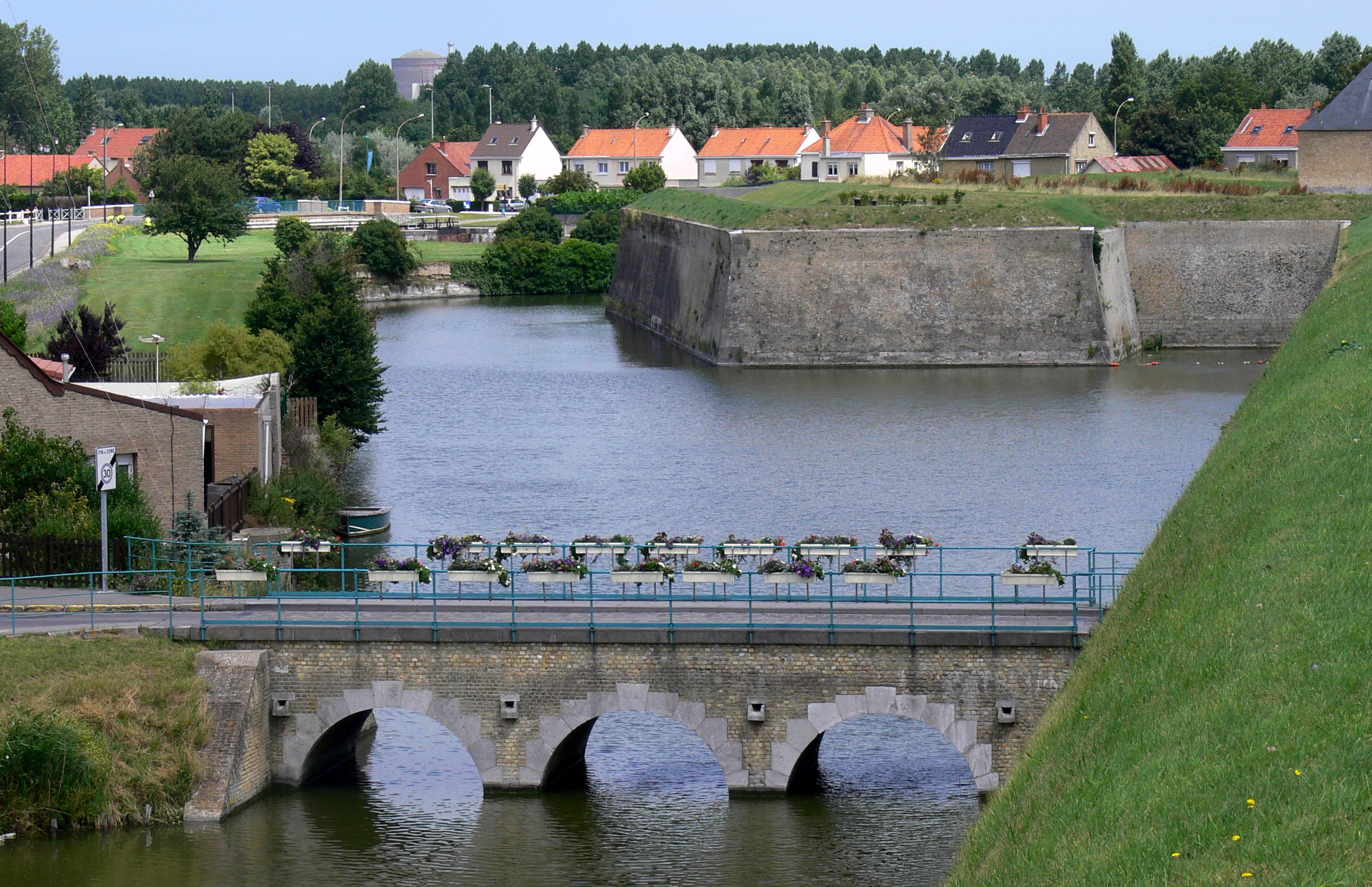 fossé du fort Vauban, Gravelines